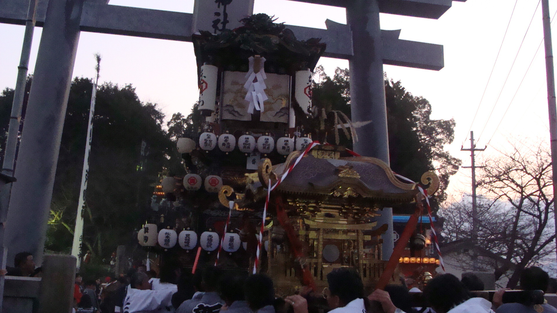 KOMATSU Matsuri 01